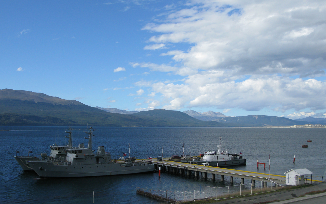 Puerto Williams (base navale) - Vue du ponton de l'armada chilienne - 2009